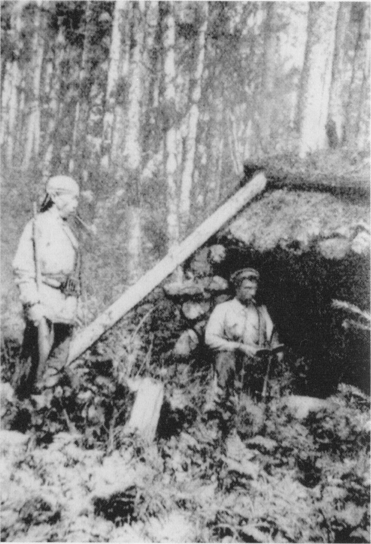 Редкая фотография Дерсу Узала в походе.